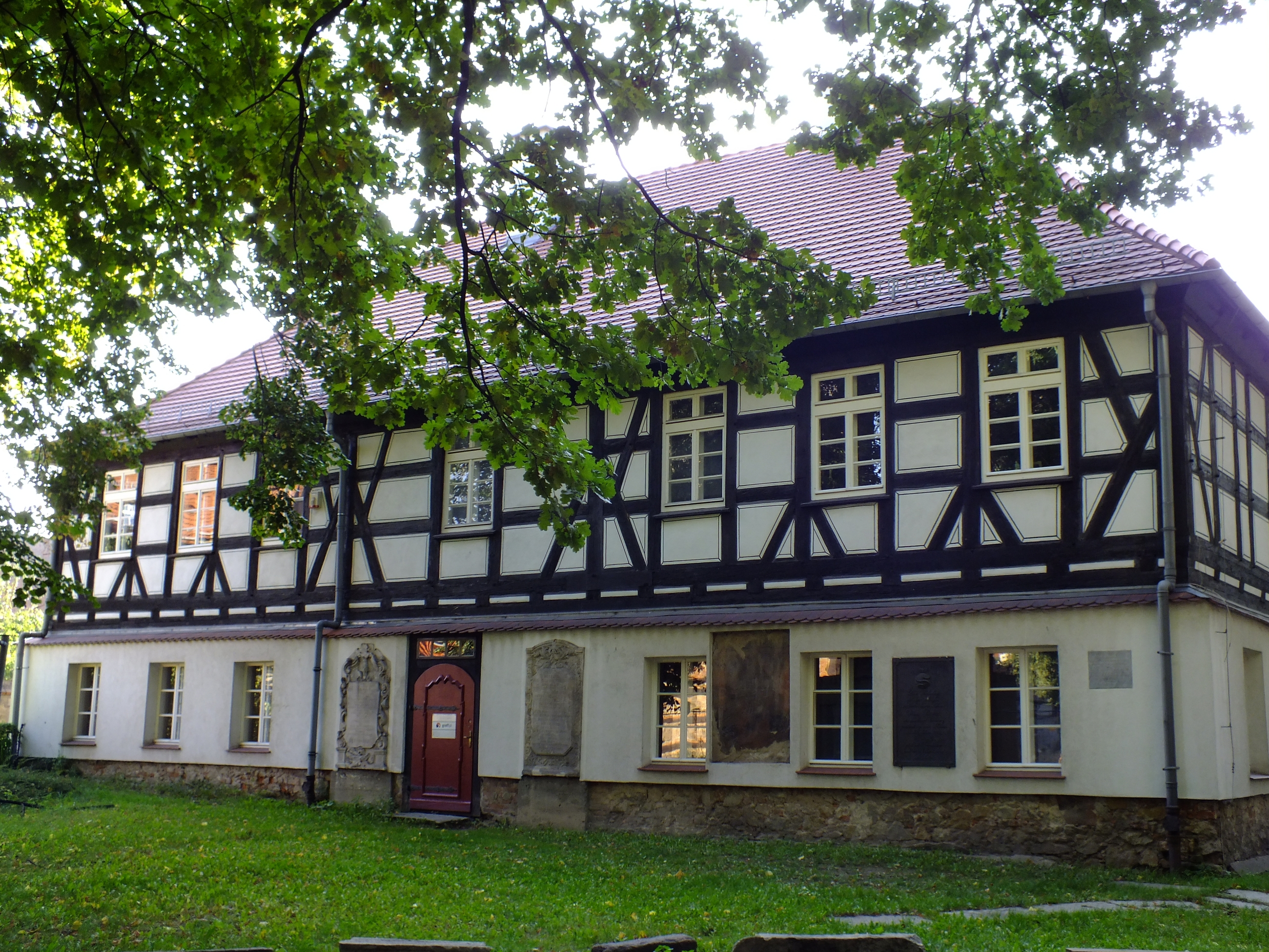 szkoła parafialna, ob. dom mieszkalny- pastorówka, ob. dom mieszkalny Świdnica, Pokoju pl. 2, 3 i 4, Świdnica